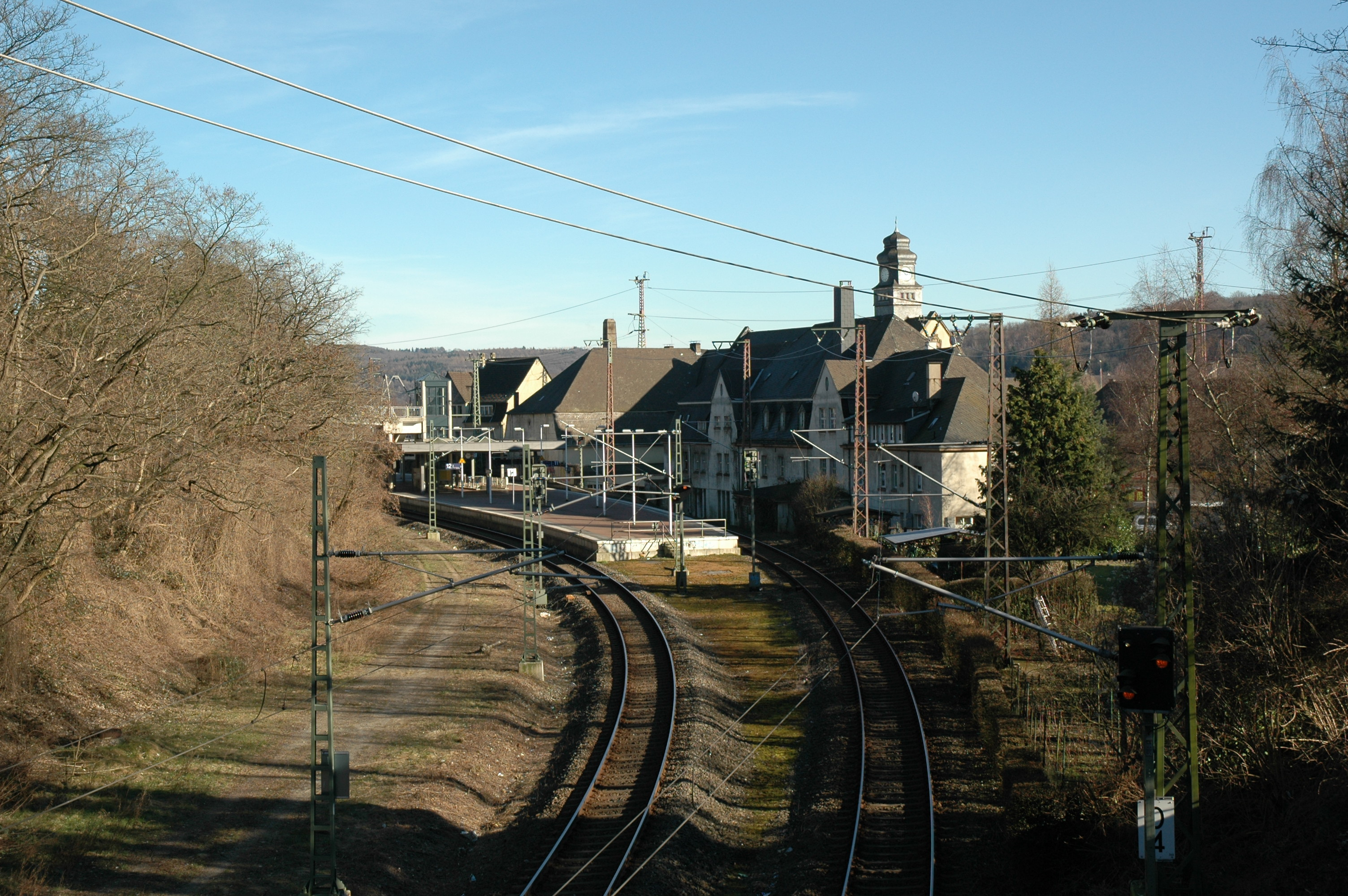 Wuppertal-Vohwinkel, Bahnhof, die nördlich gelegenen Gleise 11 und 12 des Keilbahnhofs Richtung Essen